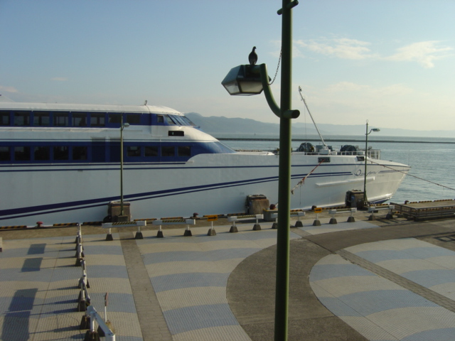 ２００４年10月頃か